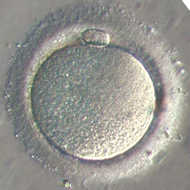 Ovocyte II